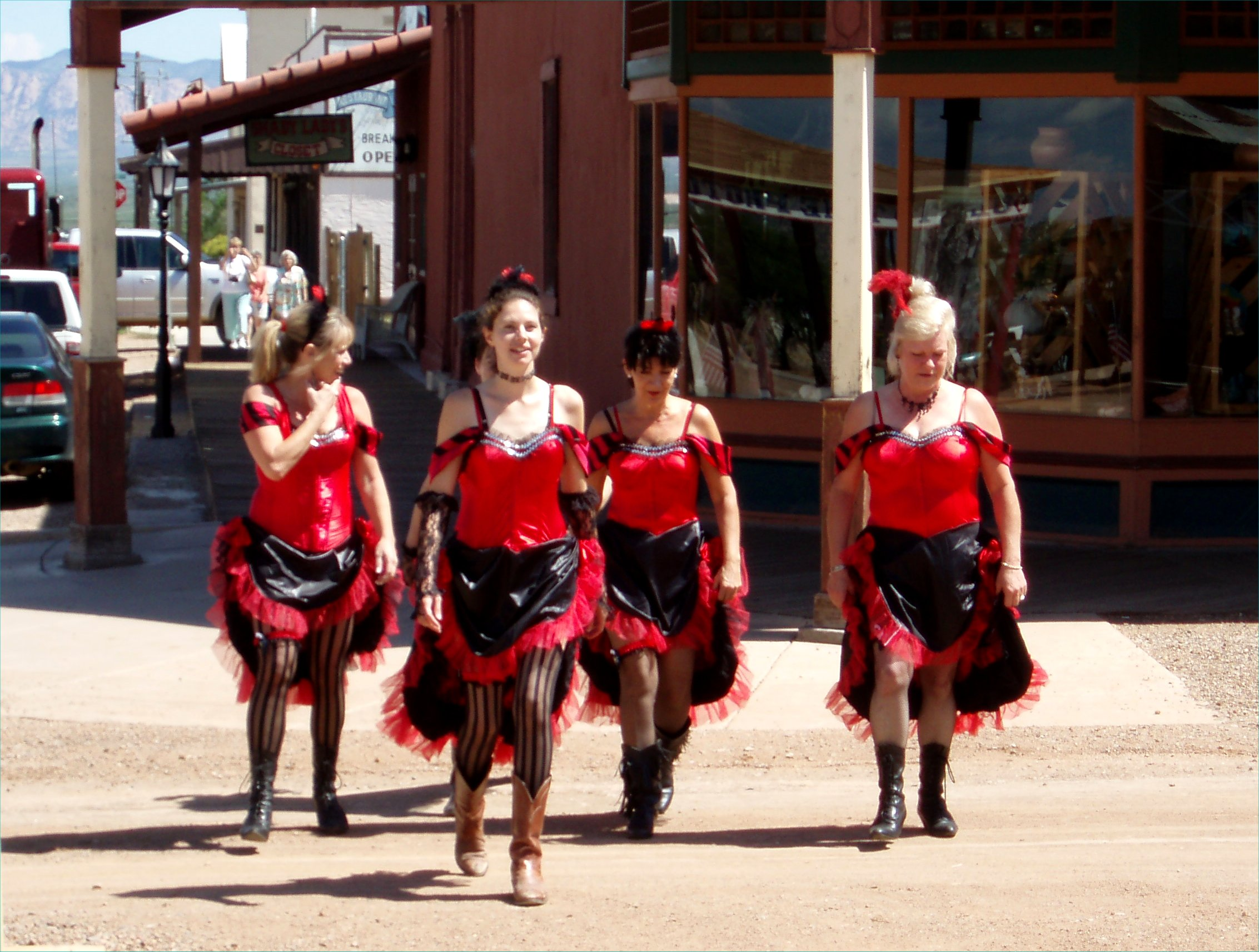 Saloon ladies on Allen Street in Tombstone, AZ.